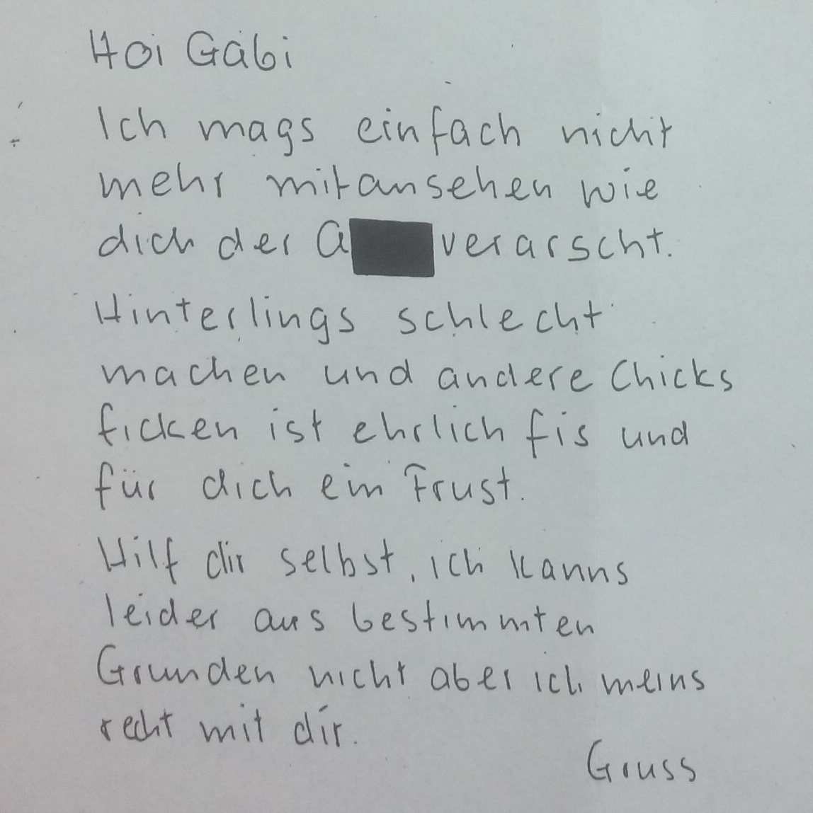 Der mutmasslich vom leitenden Bundesbeamten Hans Vogt geschriebene anonyme Brief an Gabi S. im Rahmen der Winterthurer Ereignisse.